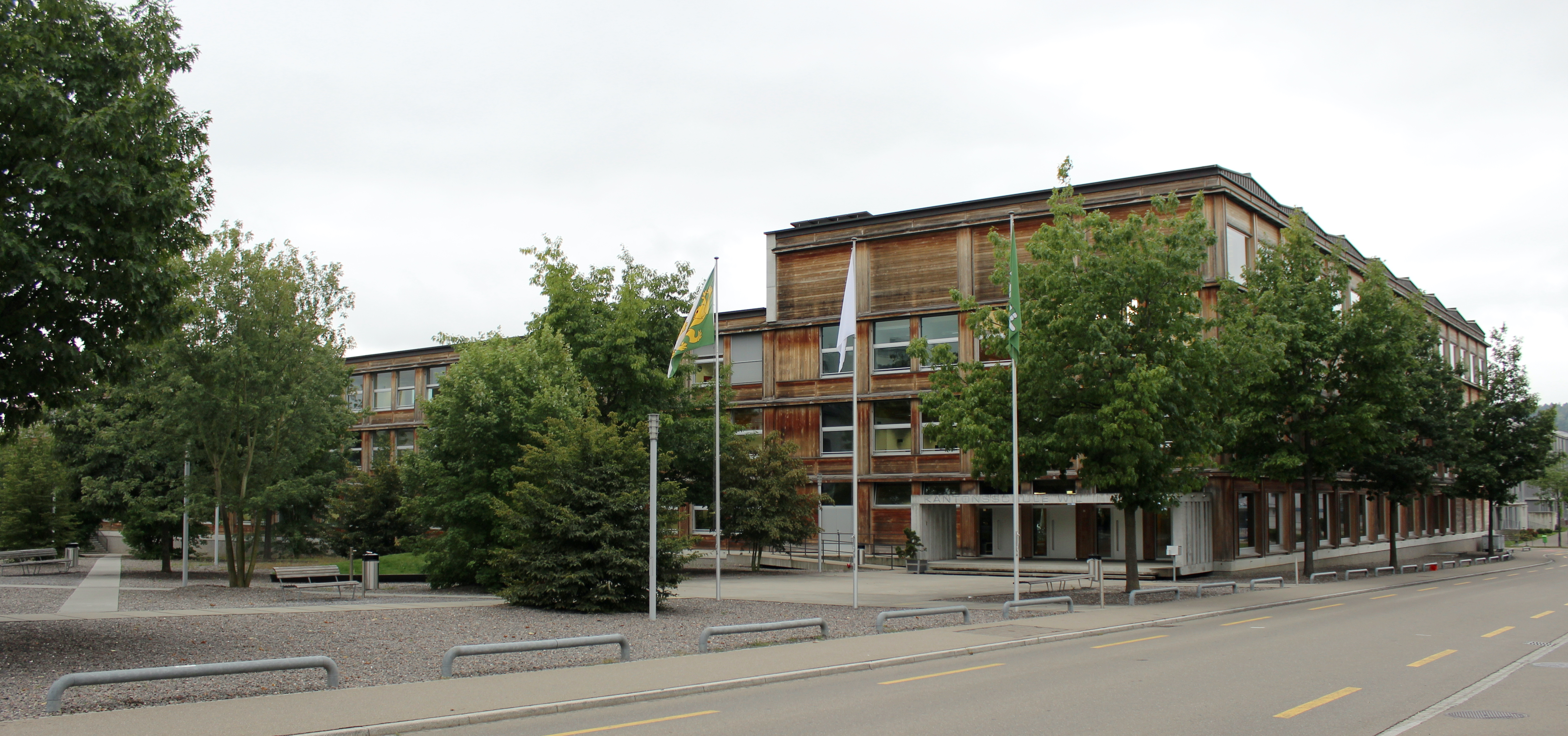 Eingang der Kantonsschule Wil SG, Schweiz